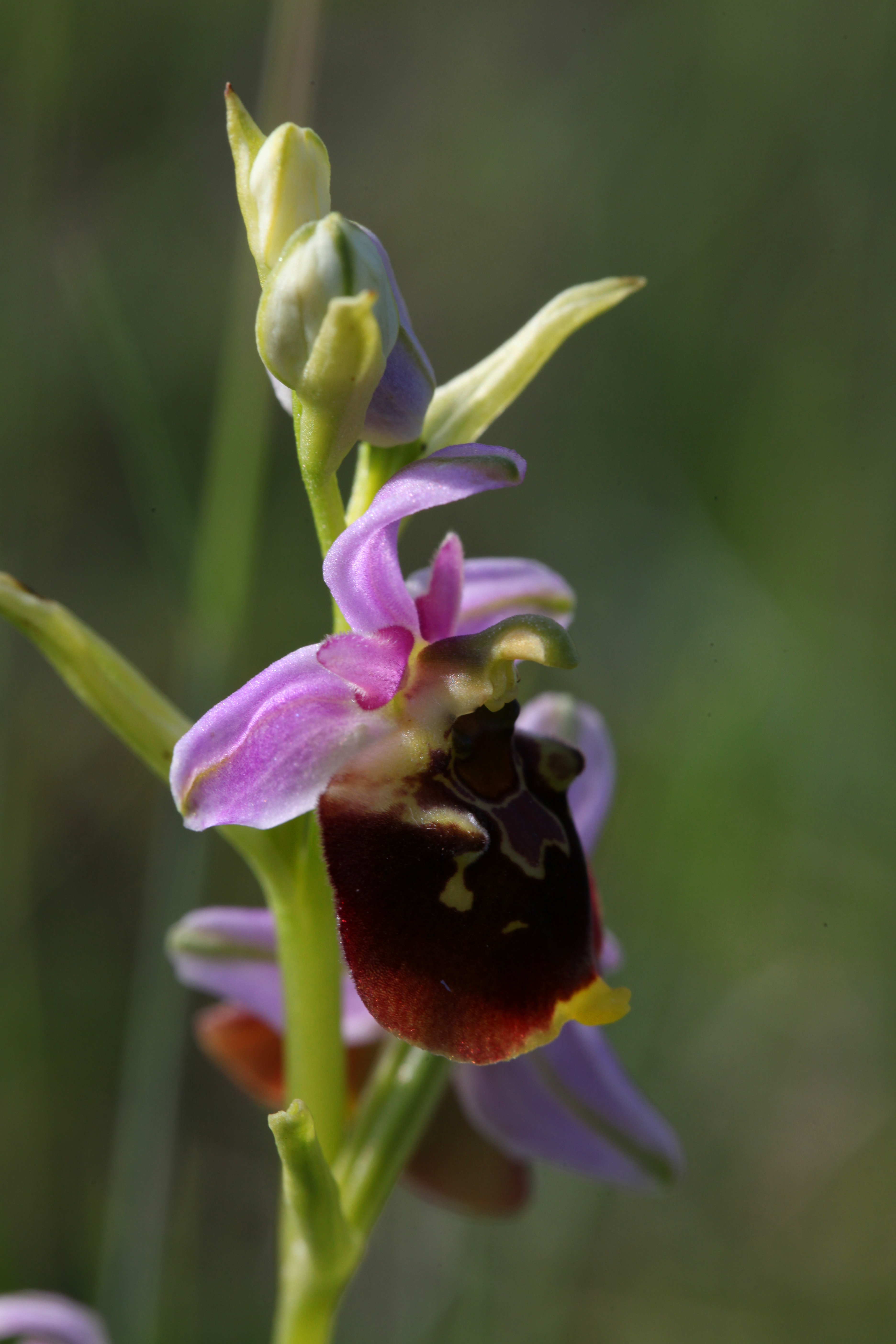 Un Ophrys frelon (Ophrys fuciflora) sur la corniche calcaire du ravin de Valbois.